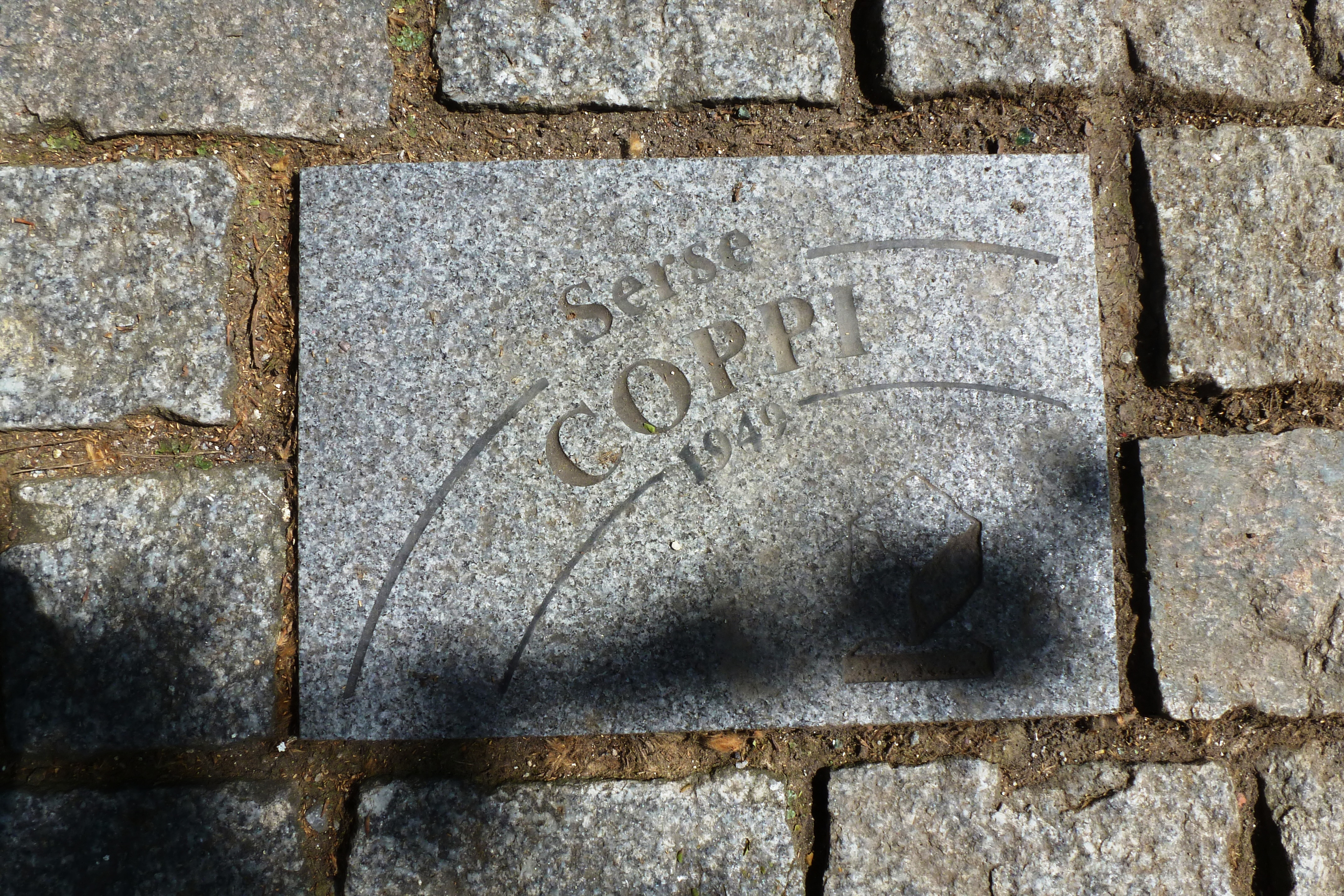 Pflasterstein für Serse Coppe auf der Allée Charles Crupelandt in Roubaix